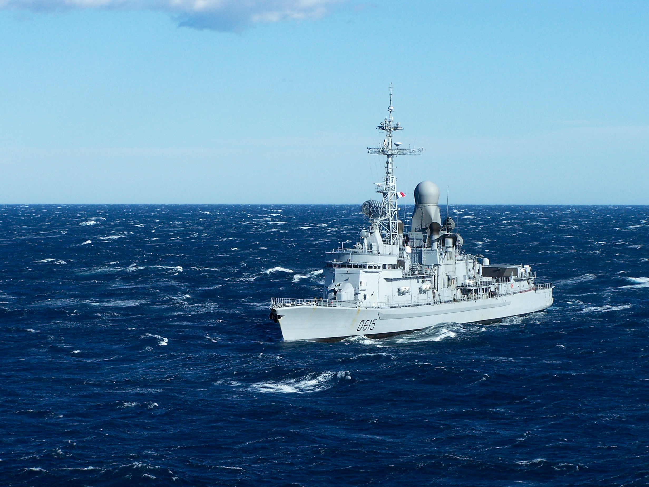 Frégate anti-aérienne Jean Bart, lors des Présentations Communes Terre-Air-Mer 2009